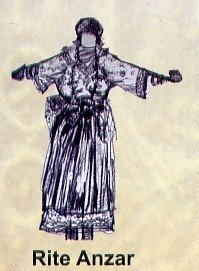 Utilisée dans le rite d'Anzar.